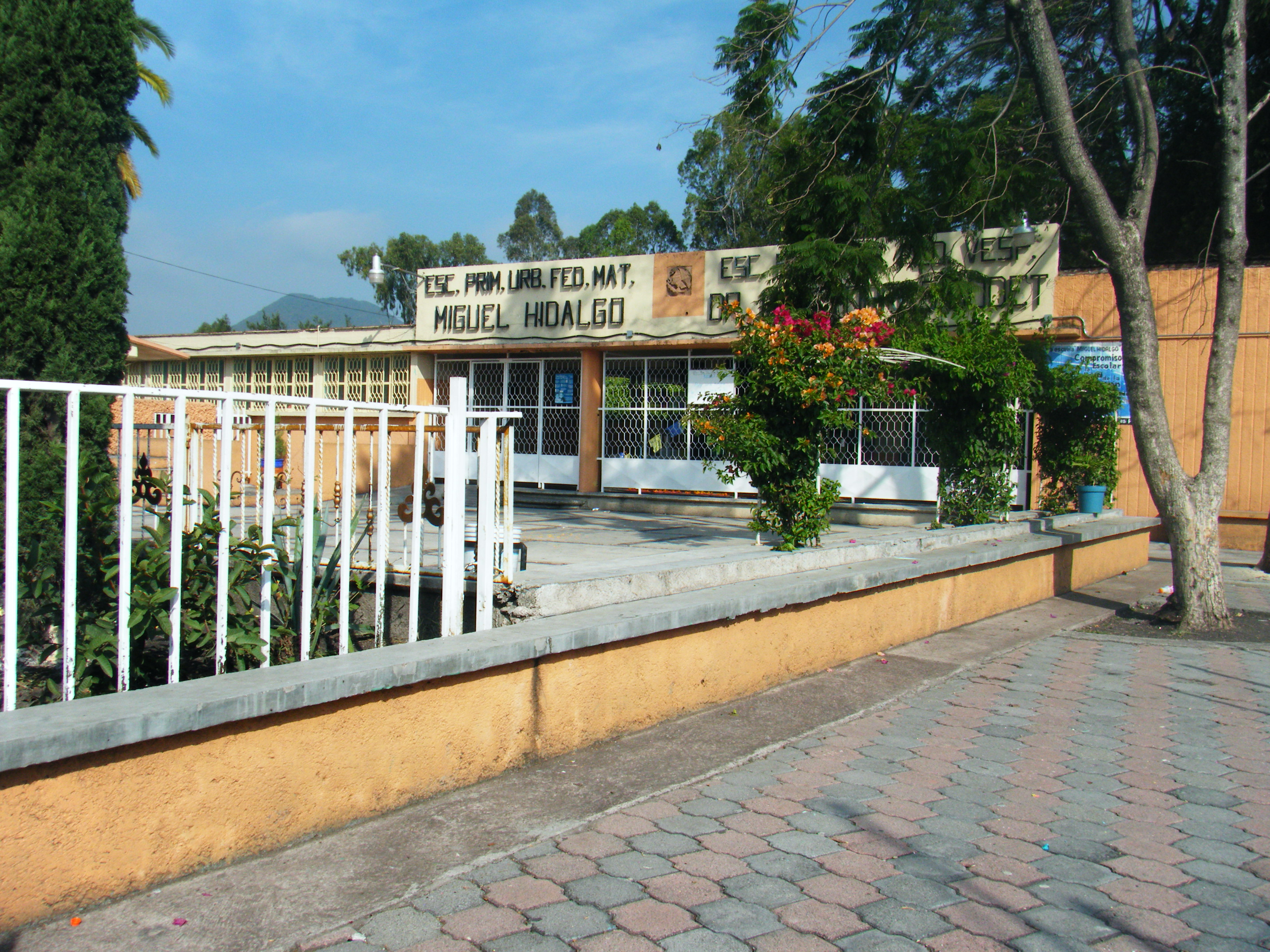 Escuela Primaria Urbana Federal Miguel Hidalgo